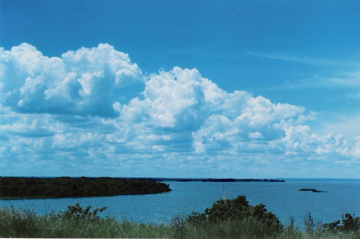 Descrição: Resquícios de Mata Atlântica no encontro dos rios Sucuriú e Paraná na Cascalheira, em Três Lagoas, Mato Grosso do Sul, Brasil. 2007.